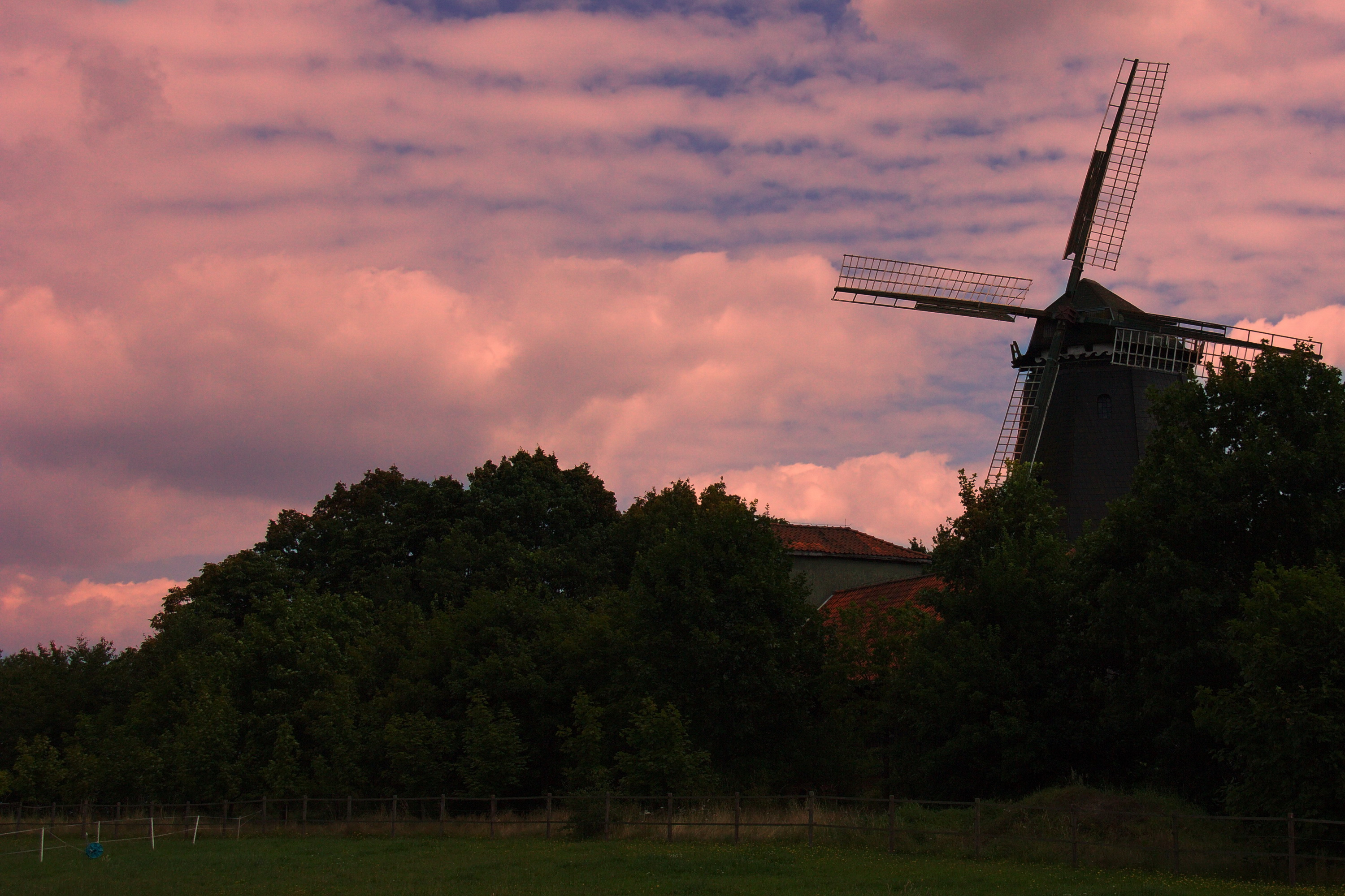 Windmühle in Holtum Geest (Kirchlinteln)